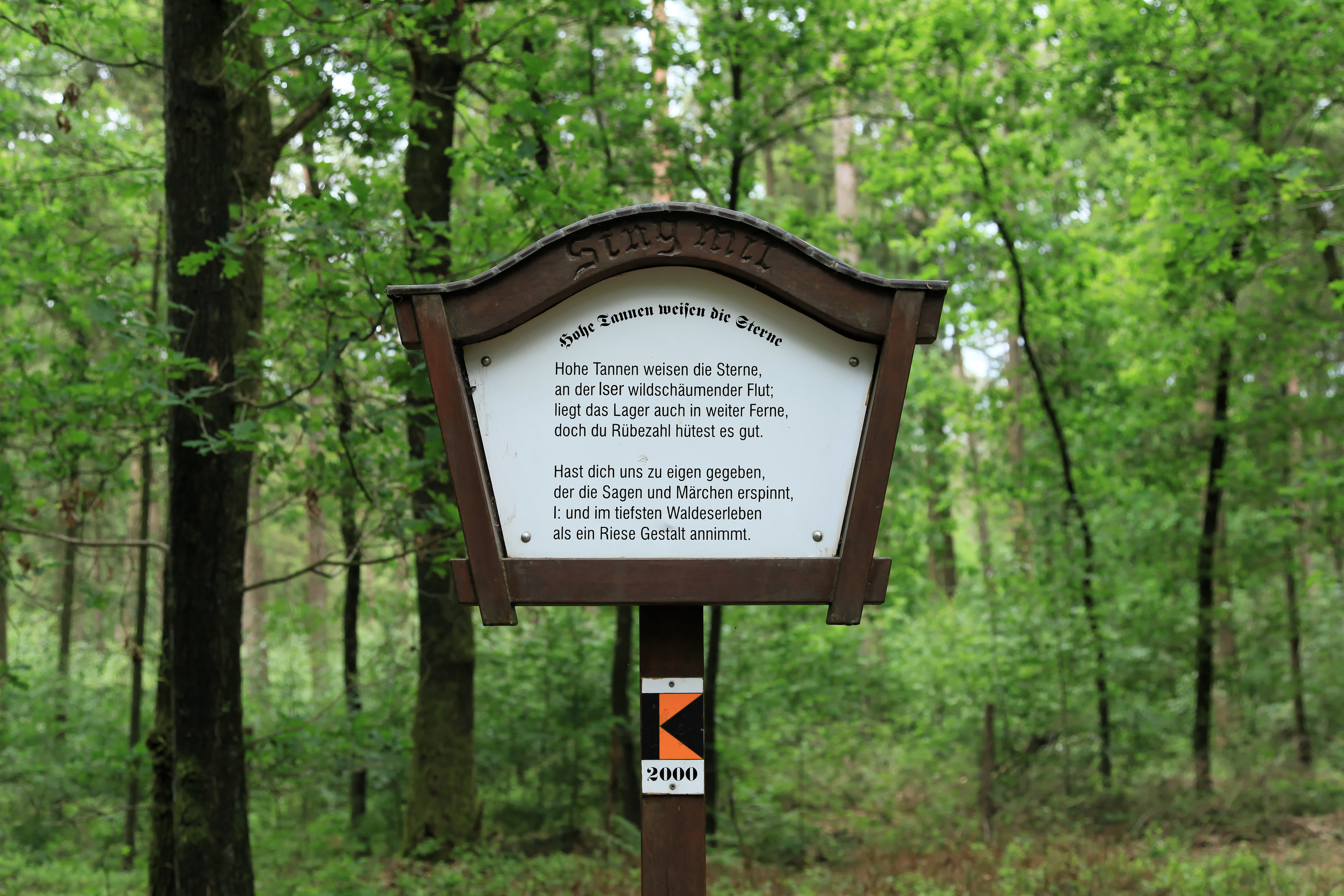 Großsteingrab in der Kunkenvenne in Thuine